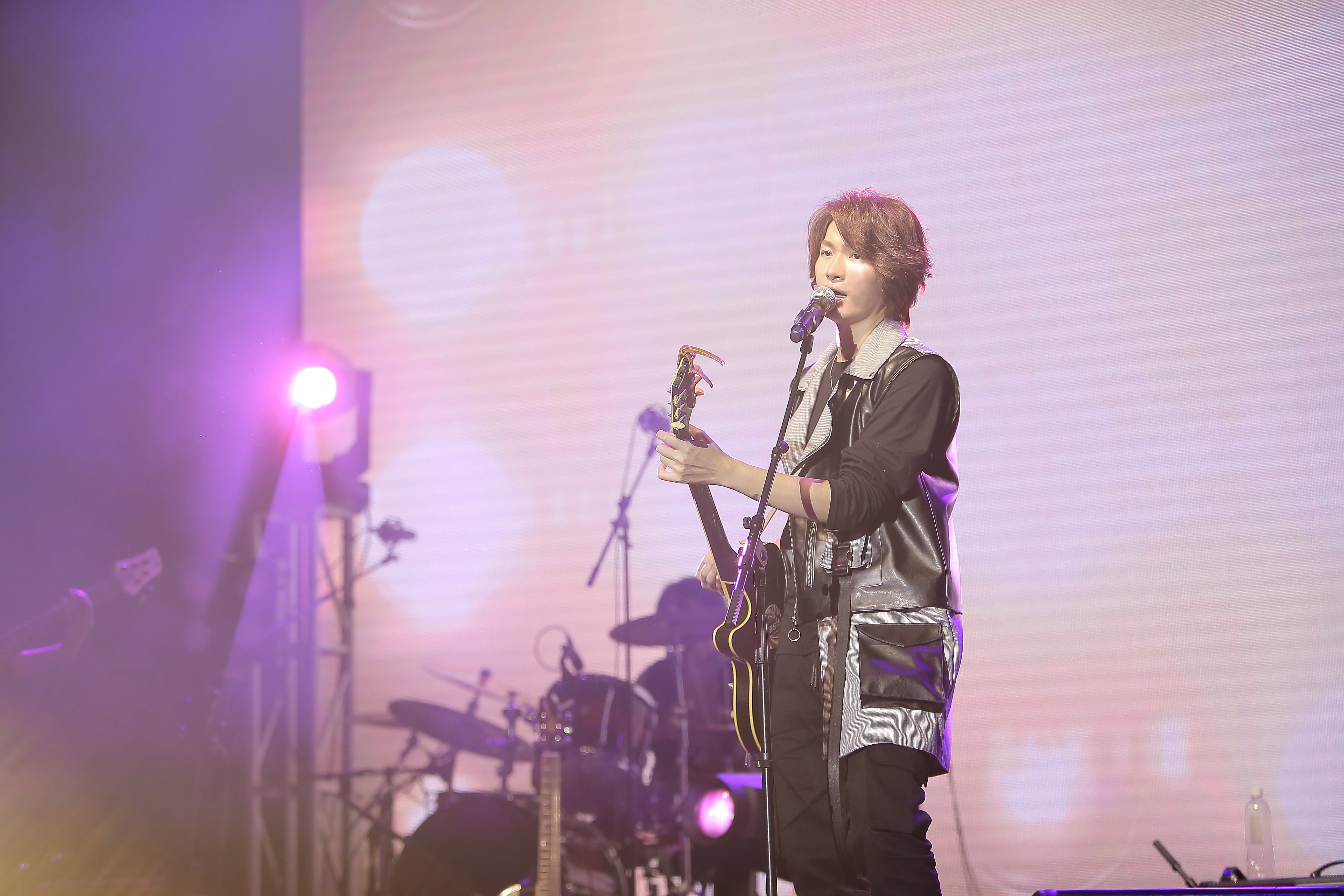 中文（台灣）: 黃少谷「遊戲人生」演唱會照片（攝於台北三創五樓）